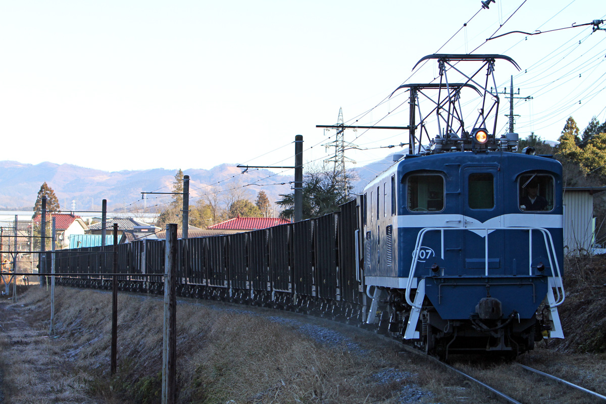 三輪線の急勾配を登る貨物列車